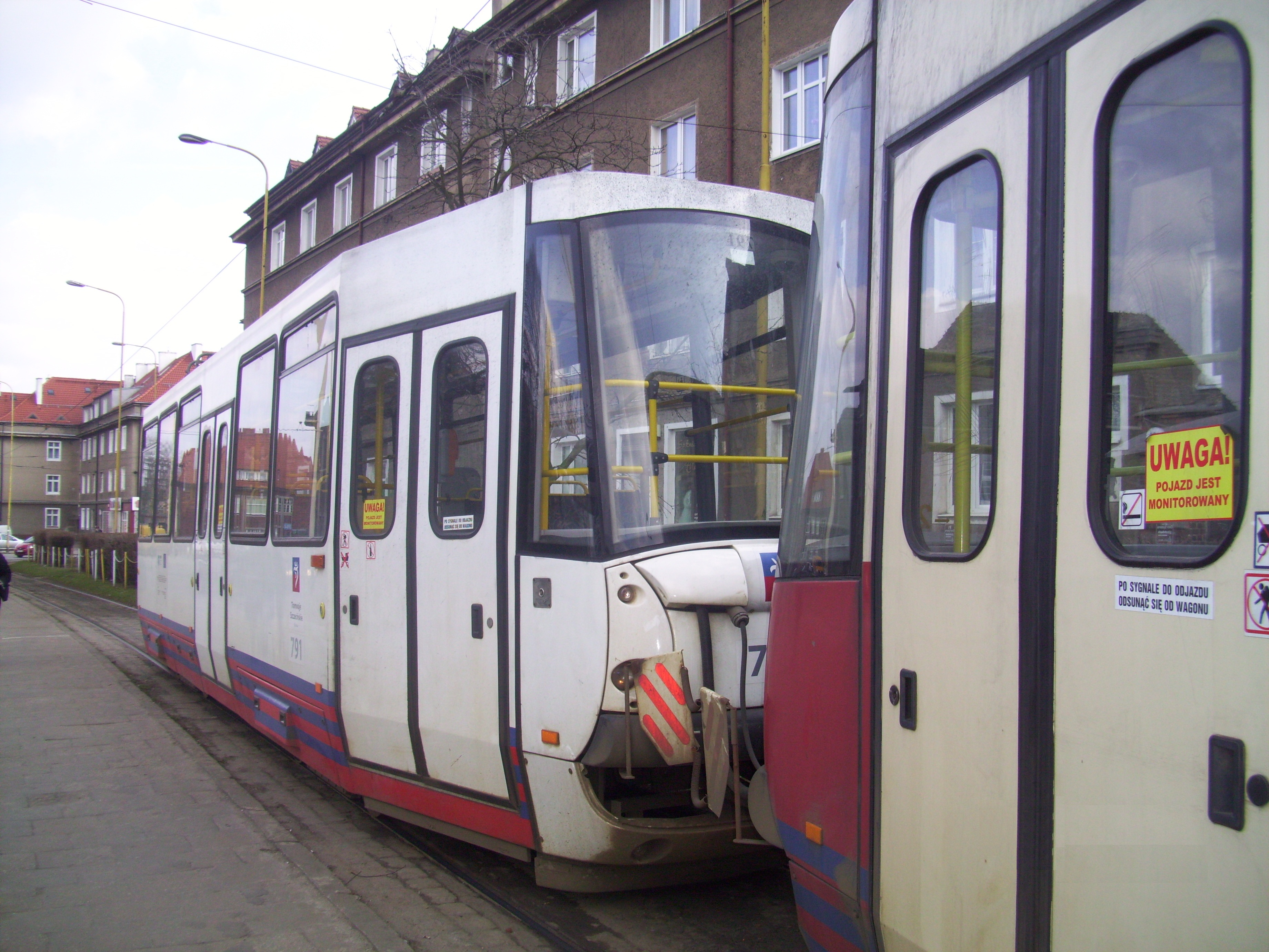 Tramwaj typu Protram 105N2k/2000 w Szczecinie